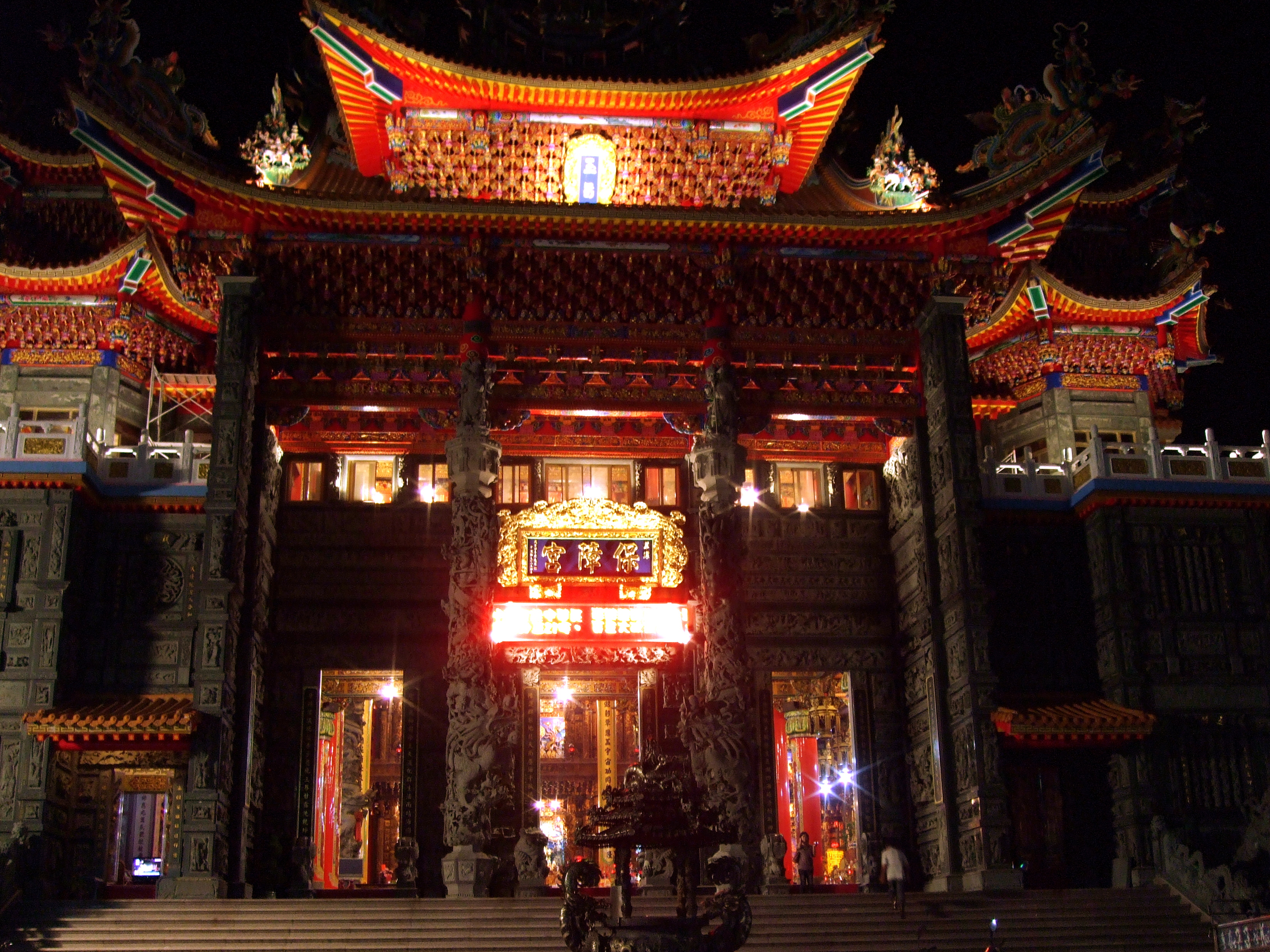 草漯保障宮正面